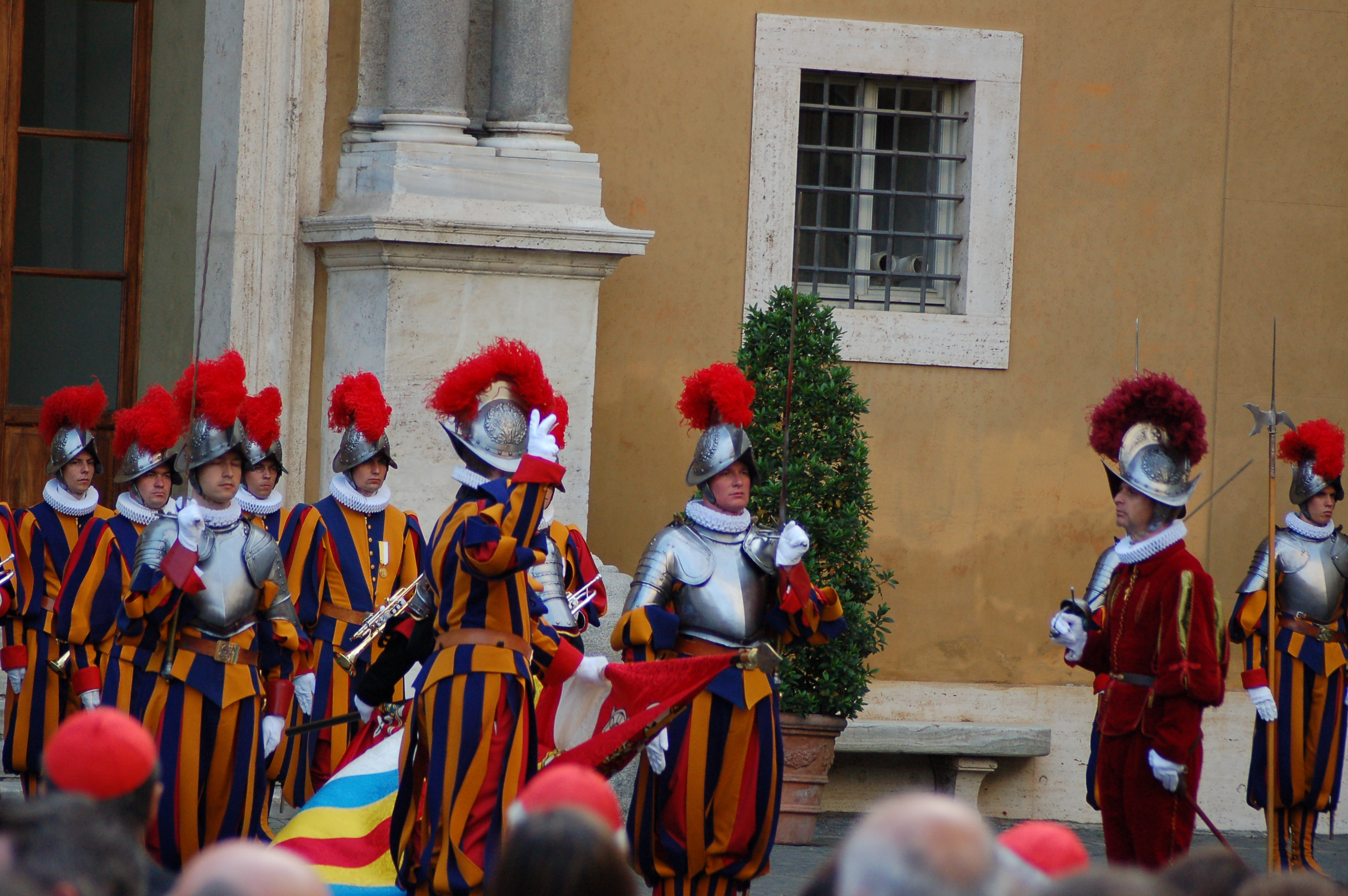 Vereidigung des Schweizergarde-Rekruten Andreas Odermatt